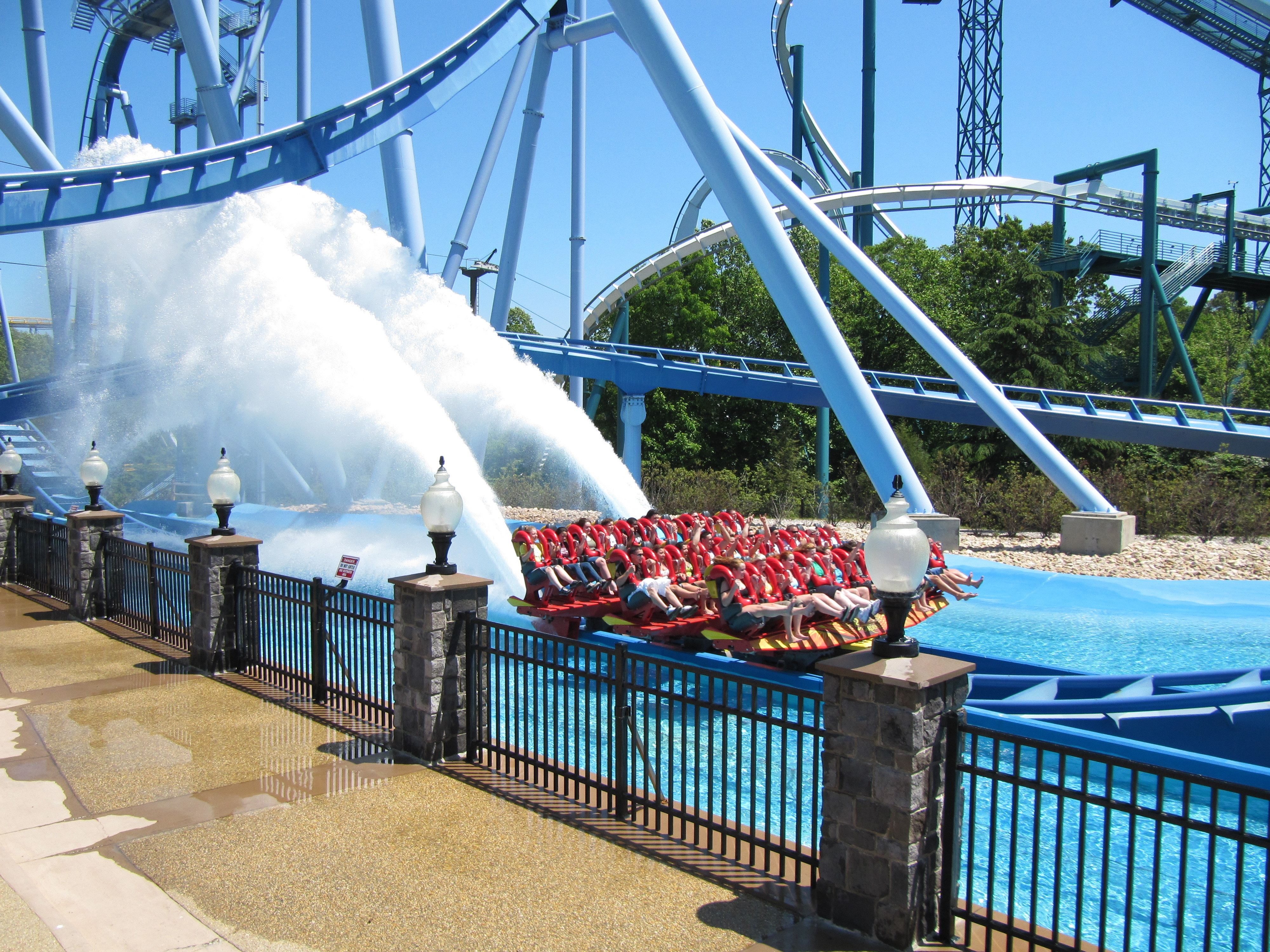 Water-Splash Griffon